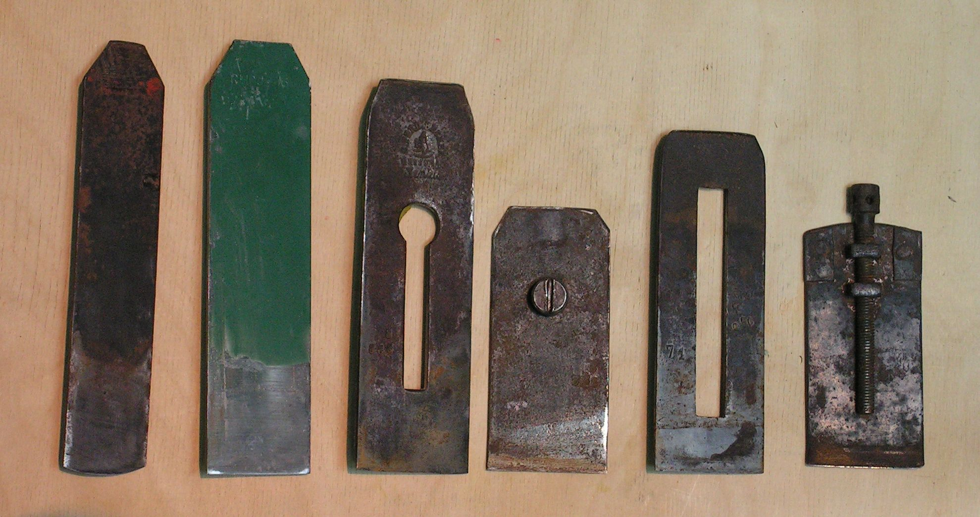 Ostrza do strugów: zdzieraka, równiaka i dwa ostrza do gładzika z różnymi nakładkami.